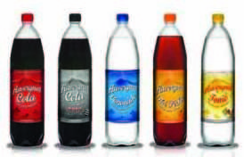 Bouteilles 150ml